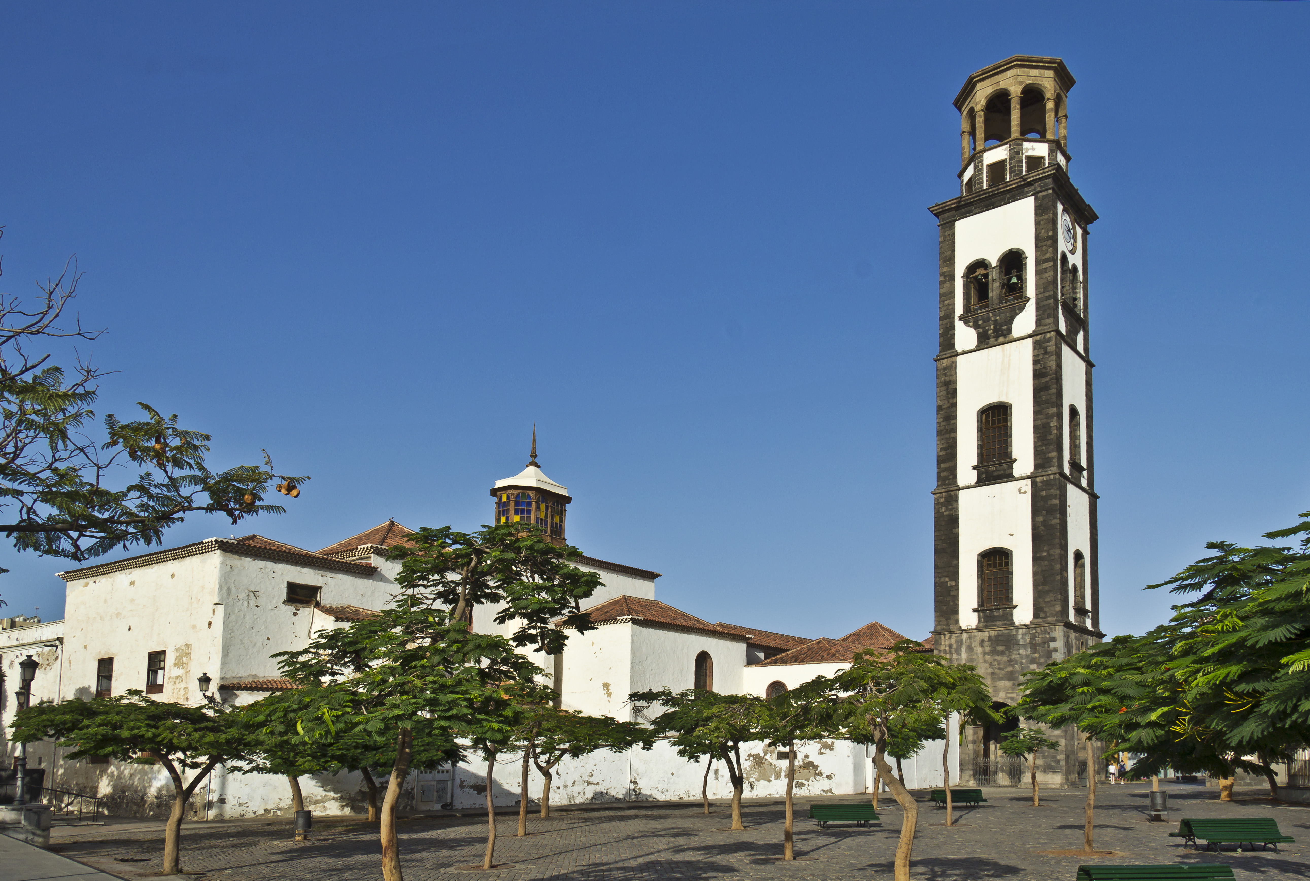 Kirche Nuestra Señora de la Concepción in Santa Cruz de Tenerife